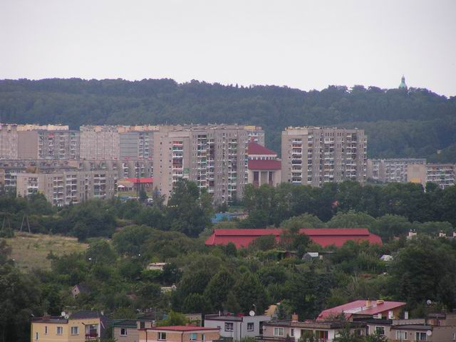 Podzamcze widoczne z Piaskowej Góry, ze Wzgórza Gedymina.